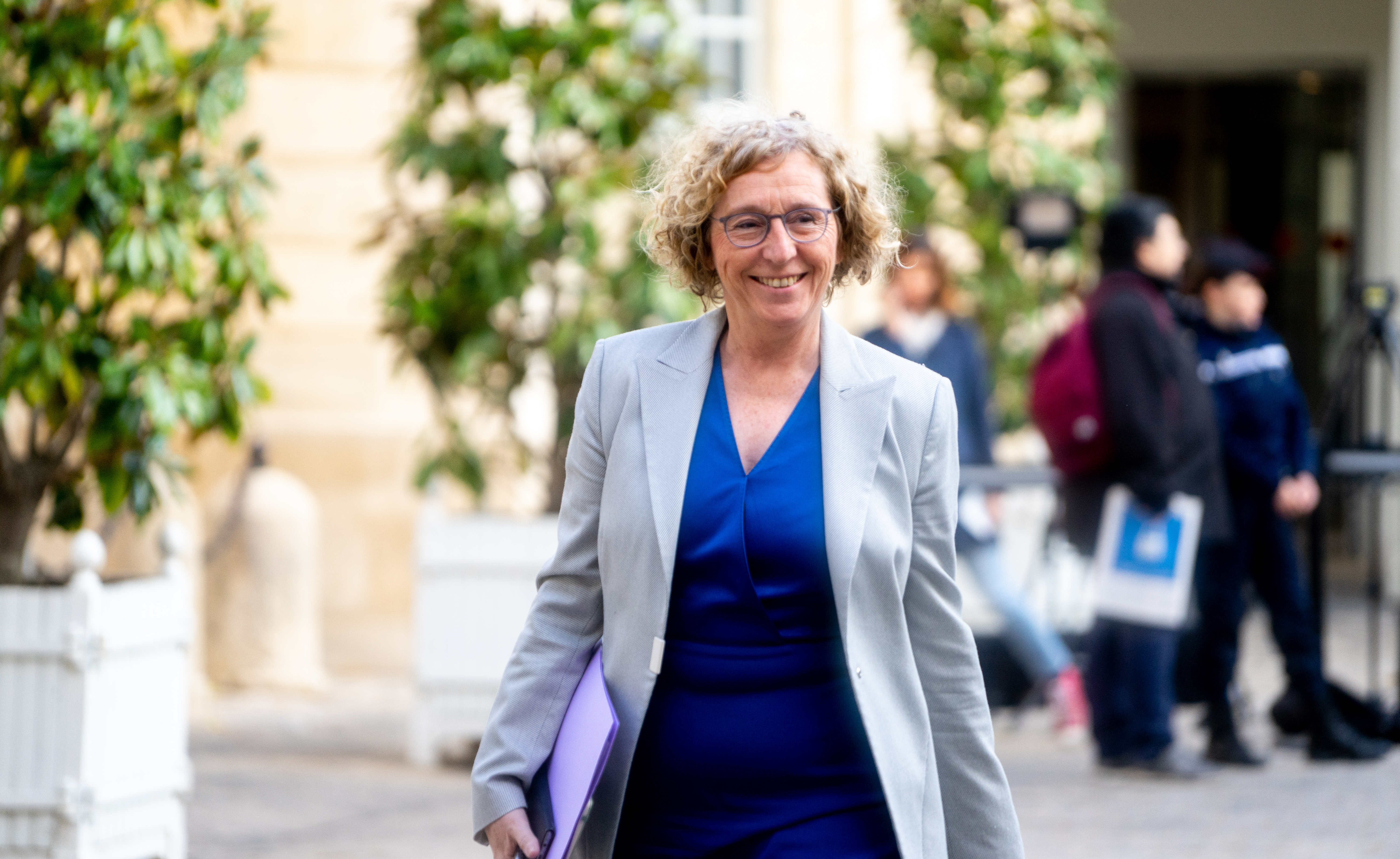 Muriel Pénicaud, Ministre du Travail le 29 avril 2019.